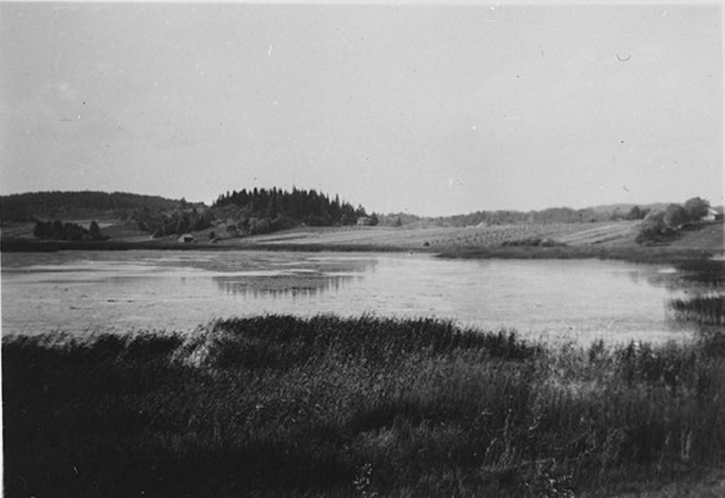 Микли, 1930-е годы.